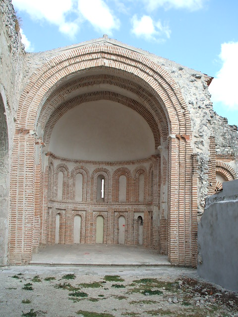 Ábside mudéjar de la iglesia de Santiago de Cuéllar.